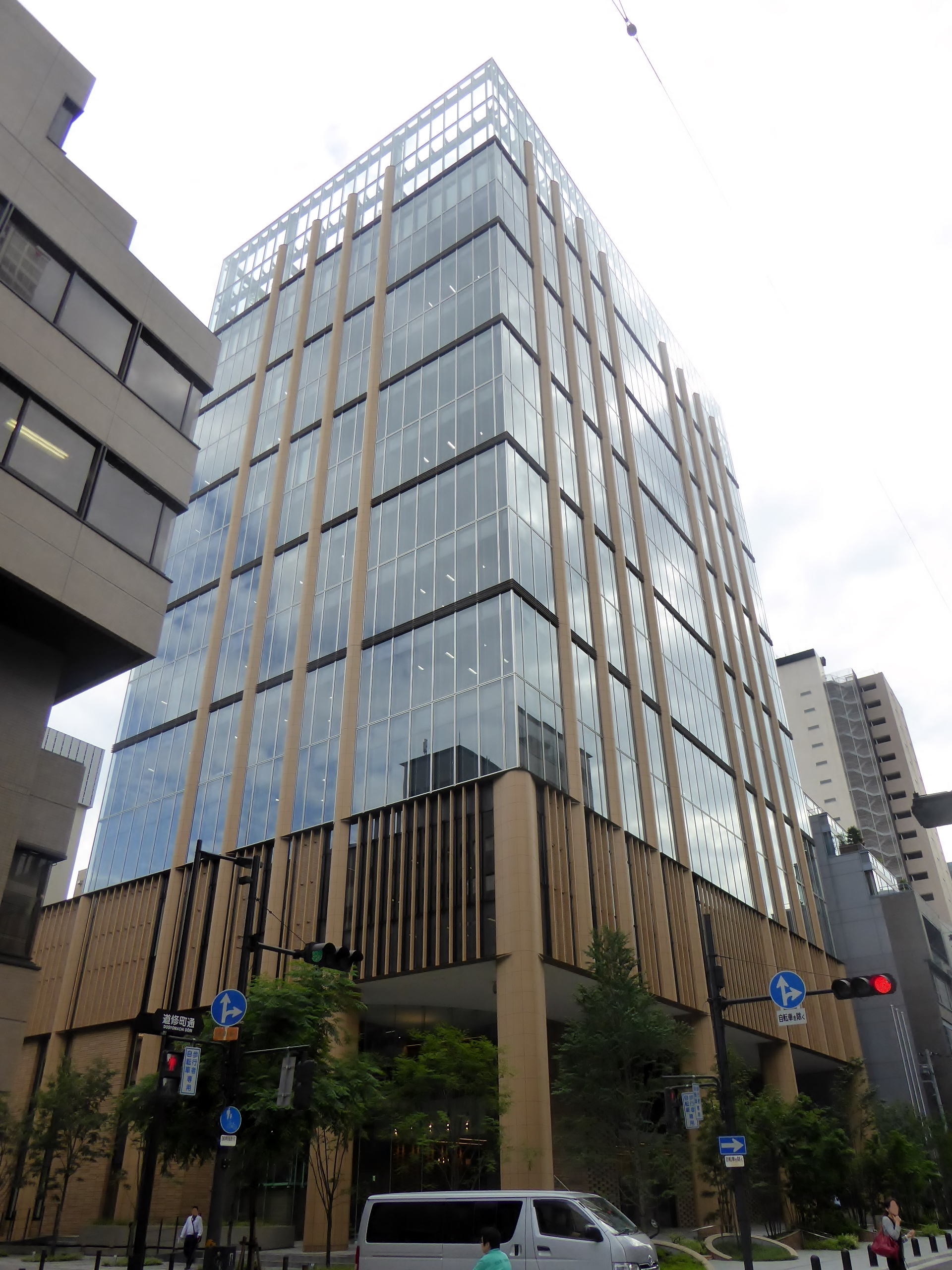 田辺三菱製薬株式会社本社を撮影。